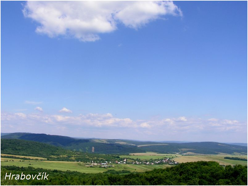 Celkový pohľad